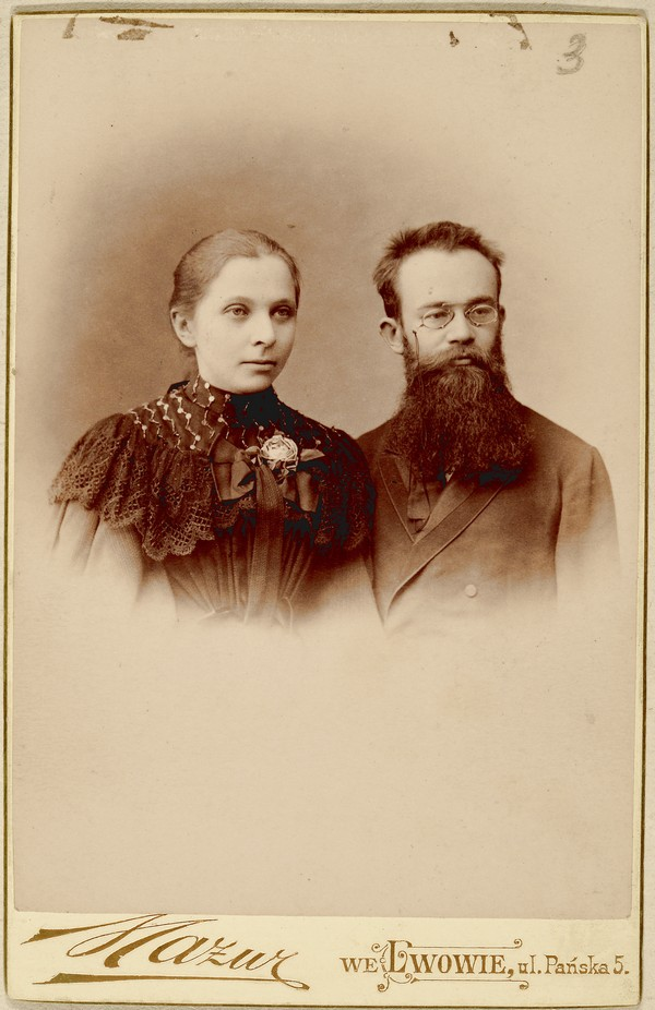 Подружжя Грушевських. ЦДІАК України, ф. 1235, оп. 1, спр. 923, арк. 3.